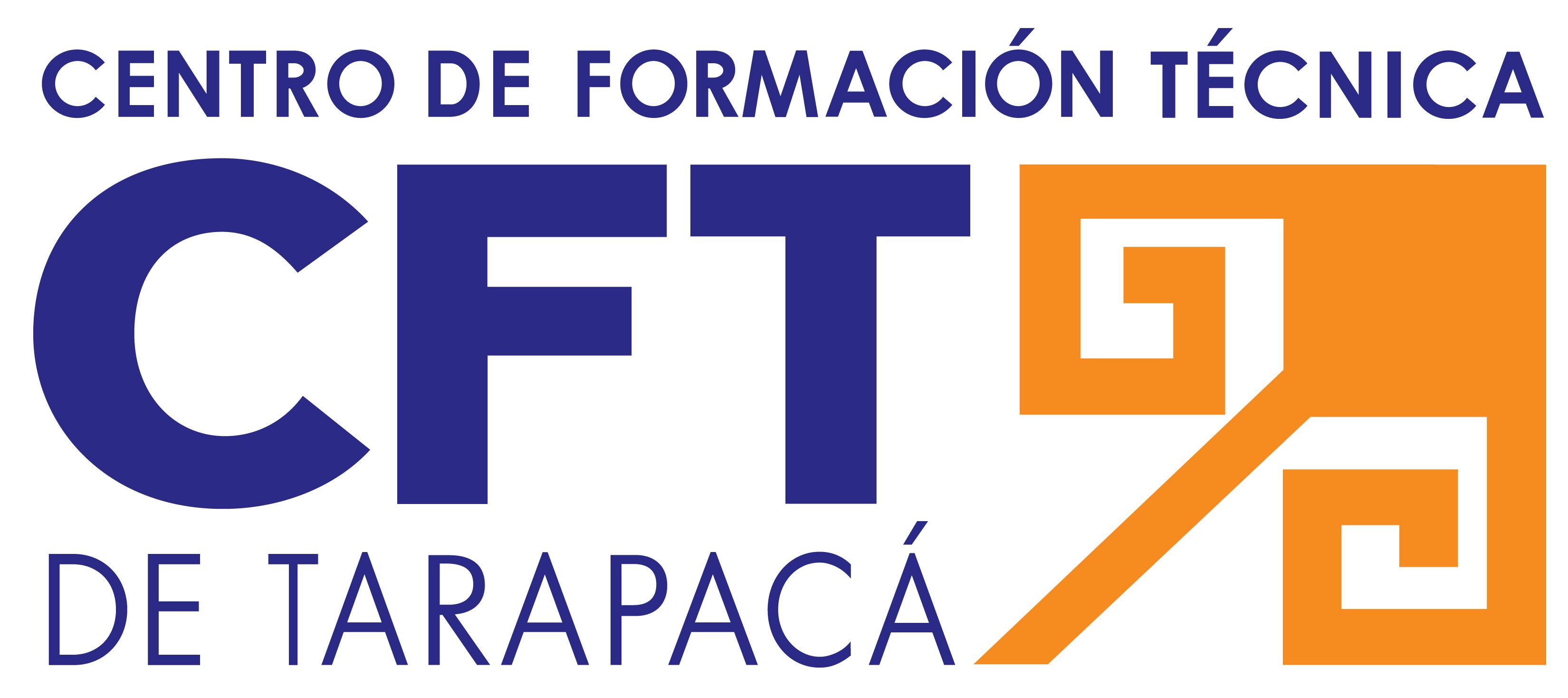 LOGO CFT